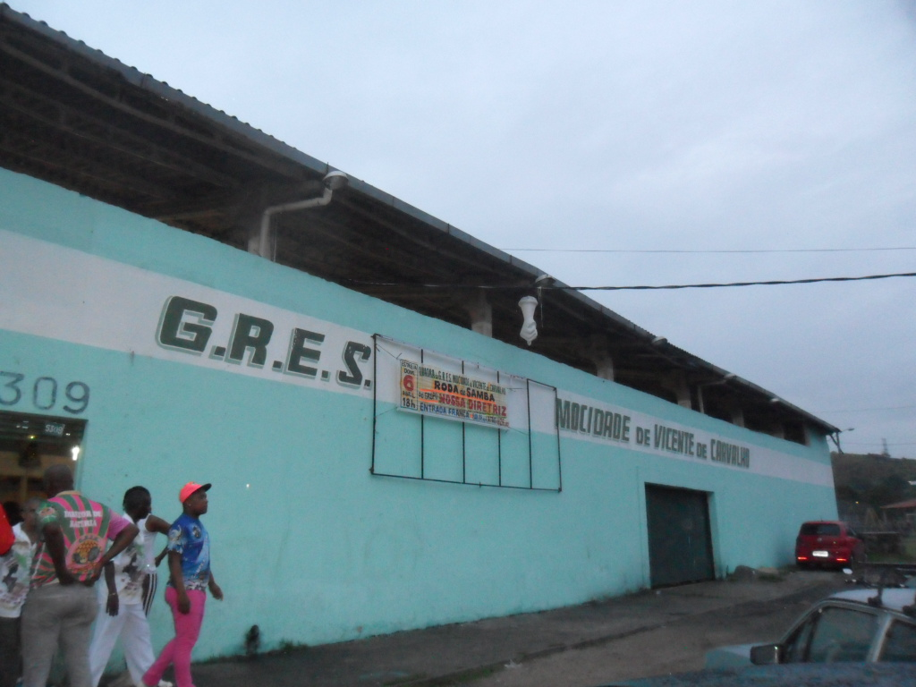 Prêmio Elite do Samba